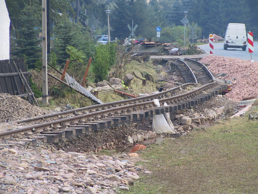 Durch das Jahrhunderthochwasser zerstörte Gleise der Weißeritztalbahn in Ulberndorf (Foto vom 17.08.2002, 17:33)